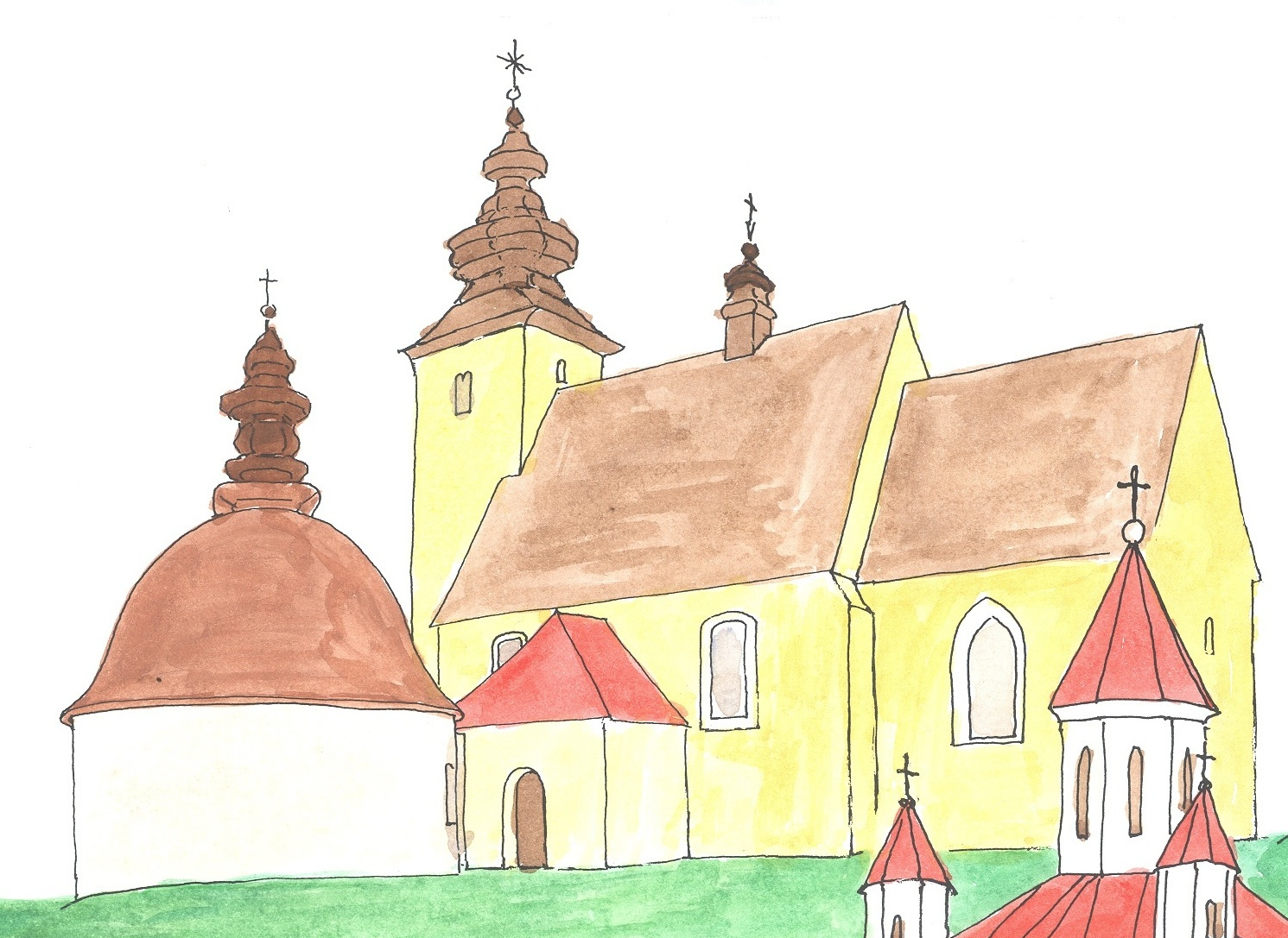 Szepesmindszent Árpád-kori temploma és a mellette álló körtemplom